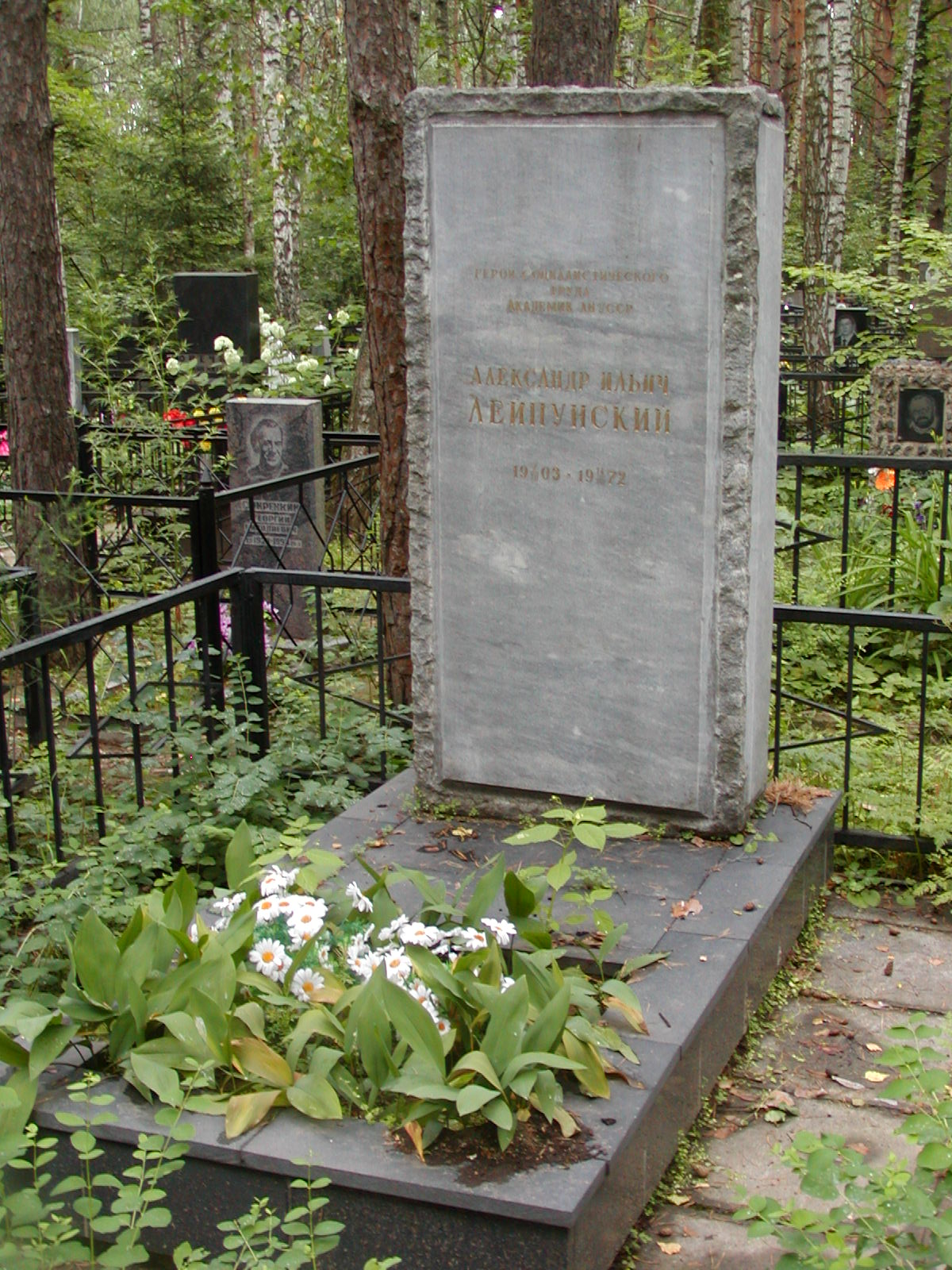 Надгробный памятник Александру Ильичу Лейпунскому на Кончаловском кладбище в Обнинске